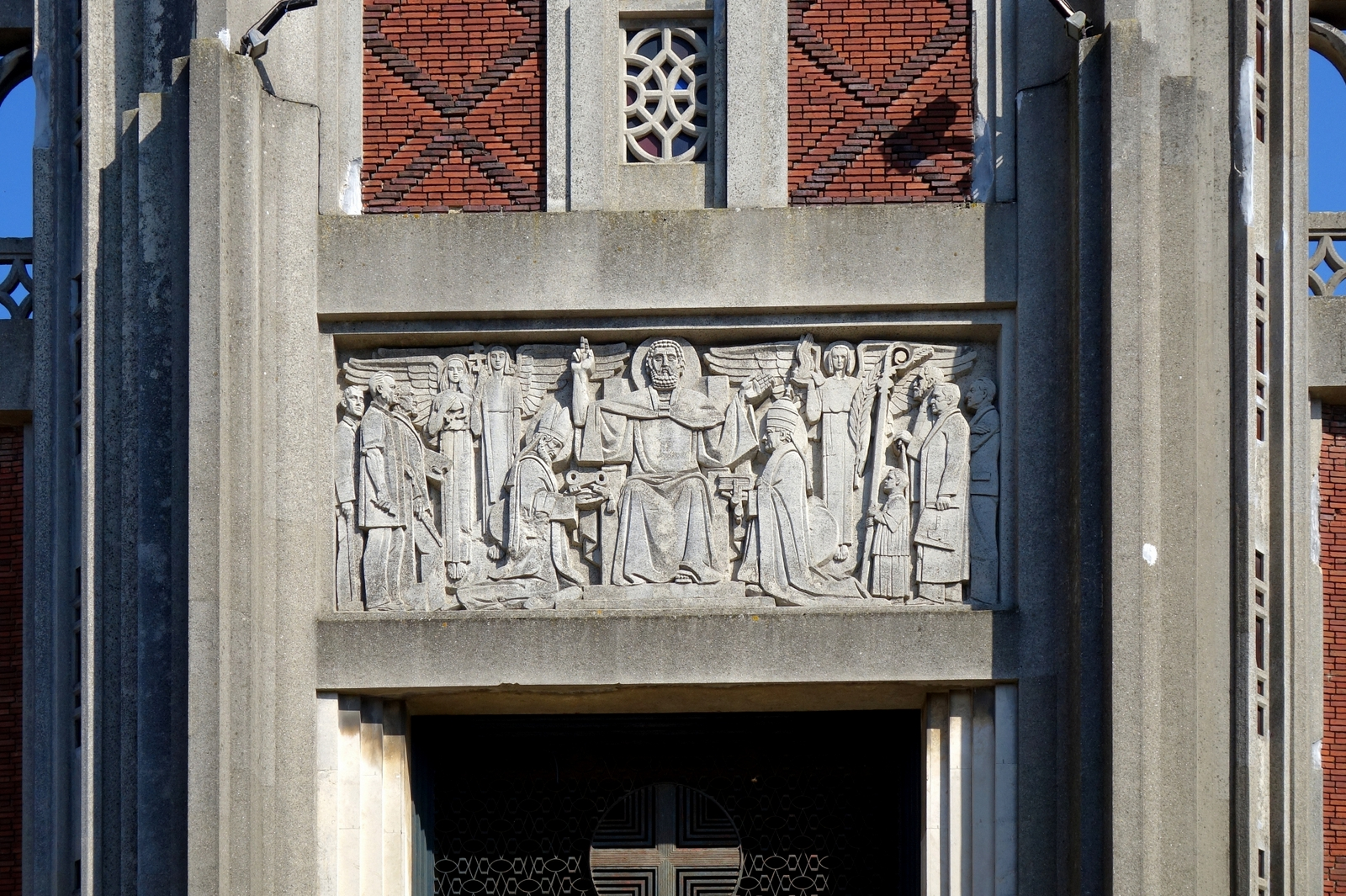 Bas-relief de Saint-Paul de Roye